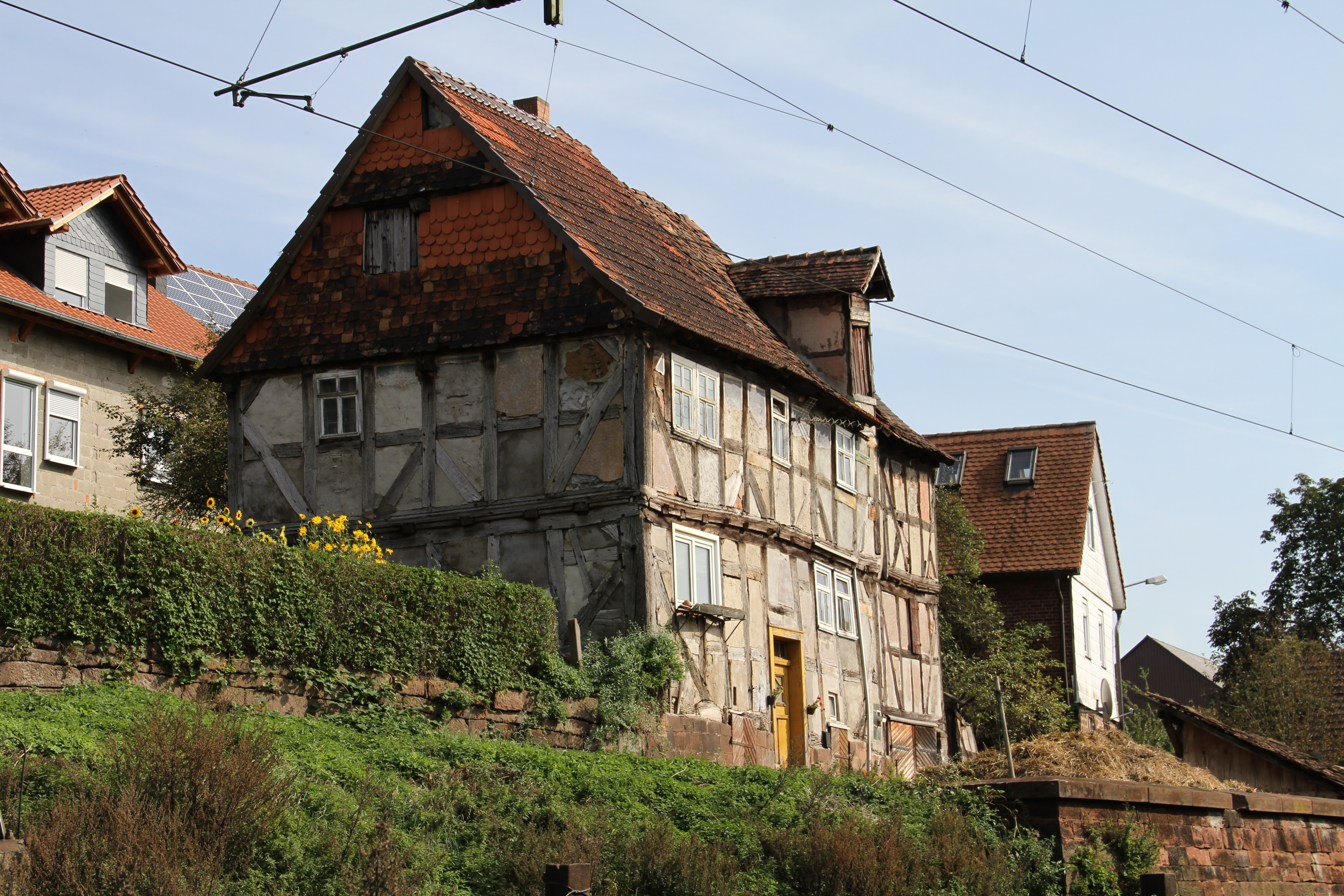 Dieses Foto entstand im Rahmen des Projekts Wiki Loves Monuments Mittelhessen, das aus dem Community-Projektbudget von Wikimedia Deutschland e. V. gefördert wurde.